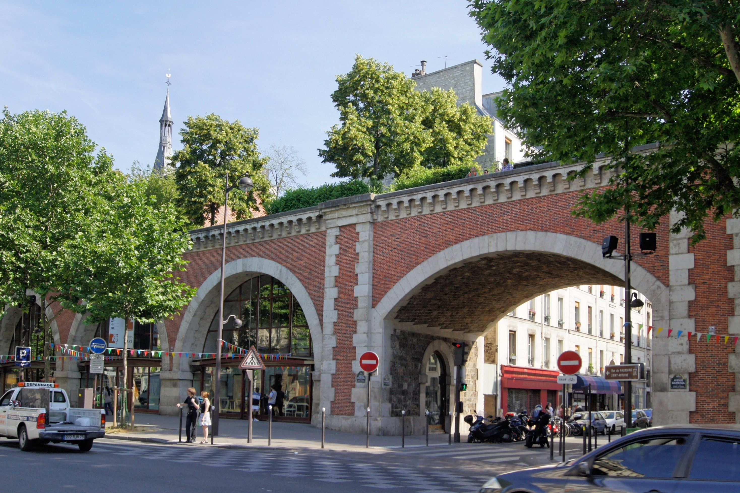 Le viaduc des arts dans le 12 ieme arrondissement de Paris . Au dessus se trouve la promenade plantée .